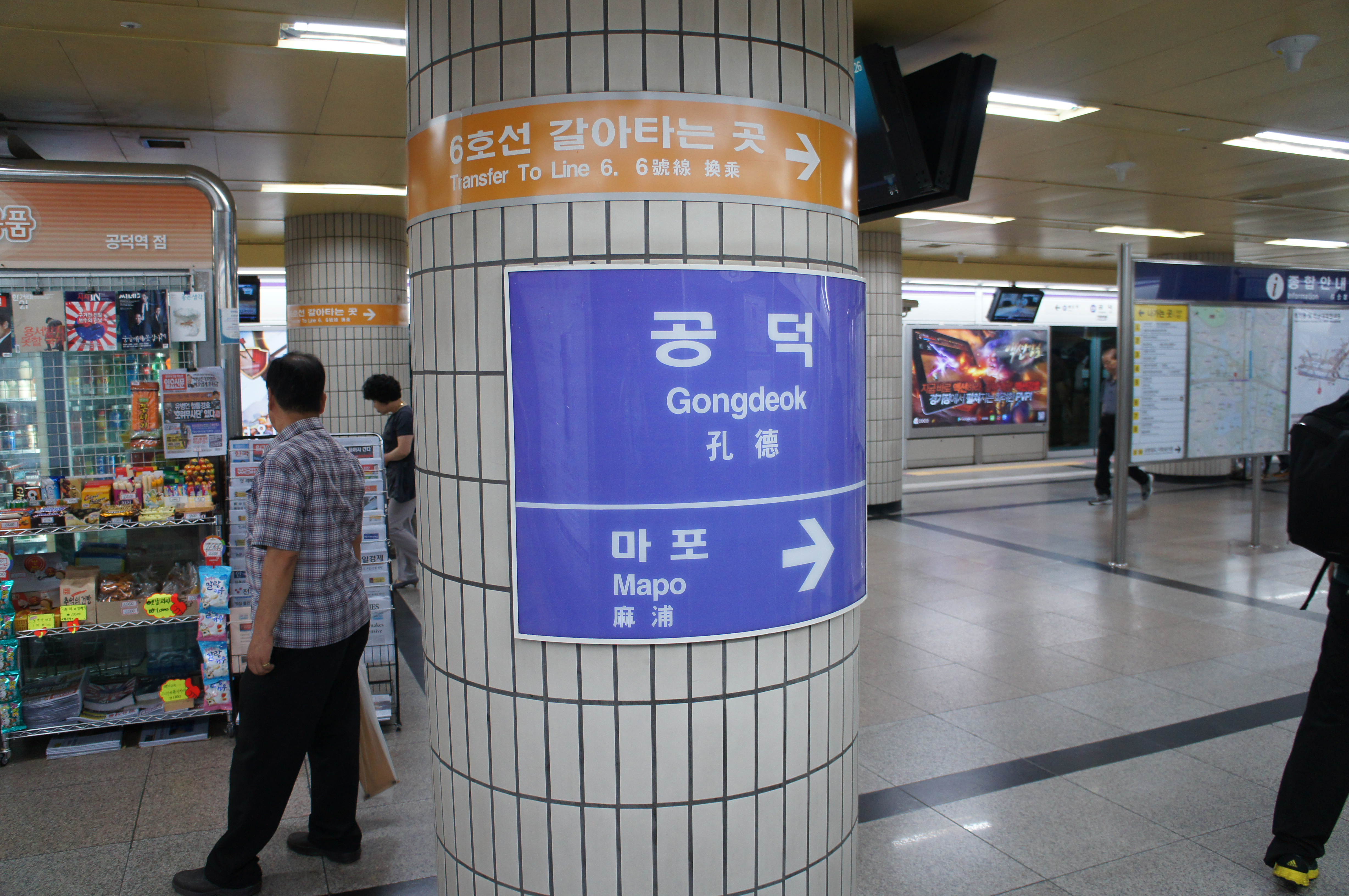 5호선 공덕역 역명판